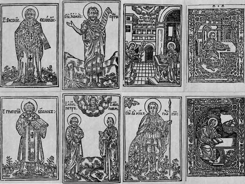 Гравюры из книг изданных в Кутеинской типографии.